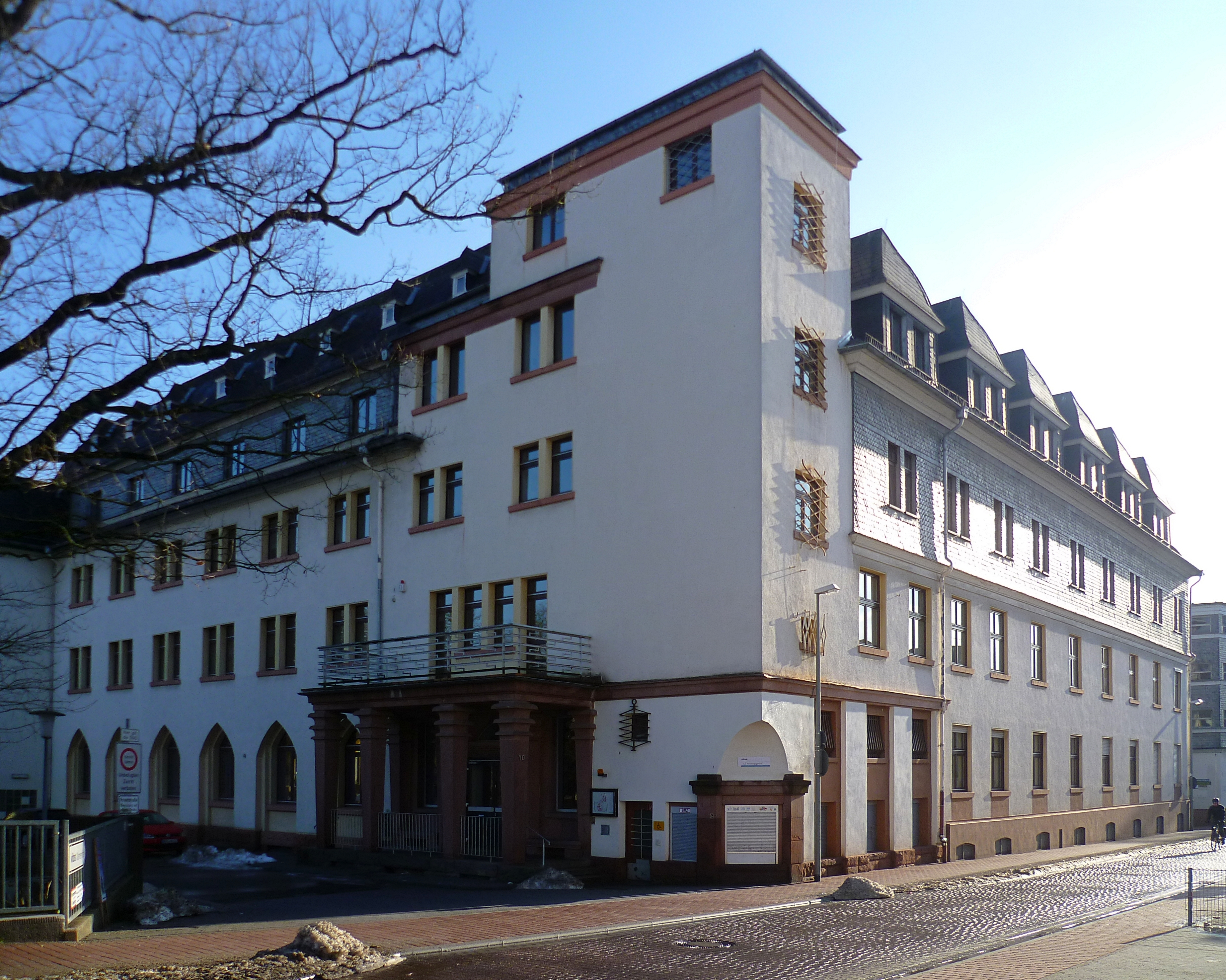 Das Hauptgebäude des Kalmenhofs in Idstein.